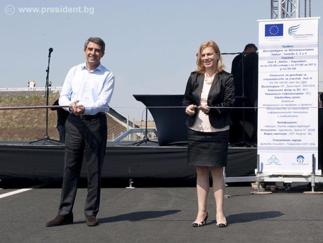 Росен Плевнелиев и Десислава Терзиева при церемонията по откриване на последния завършен участък от автомагистрала Тракия